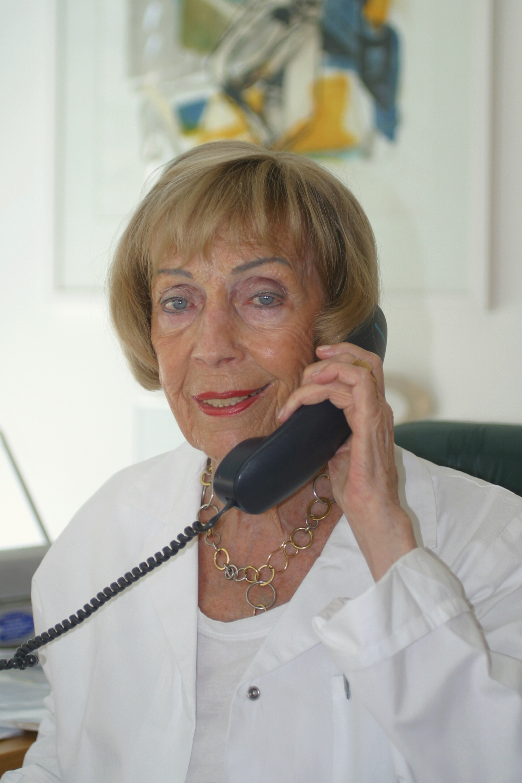 Porträtfotografie der Stuttgarter Virologin Prof. Dr. Gisela Enders.